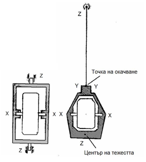 Двустепенен жироскоп и жиромахало